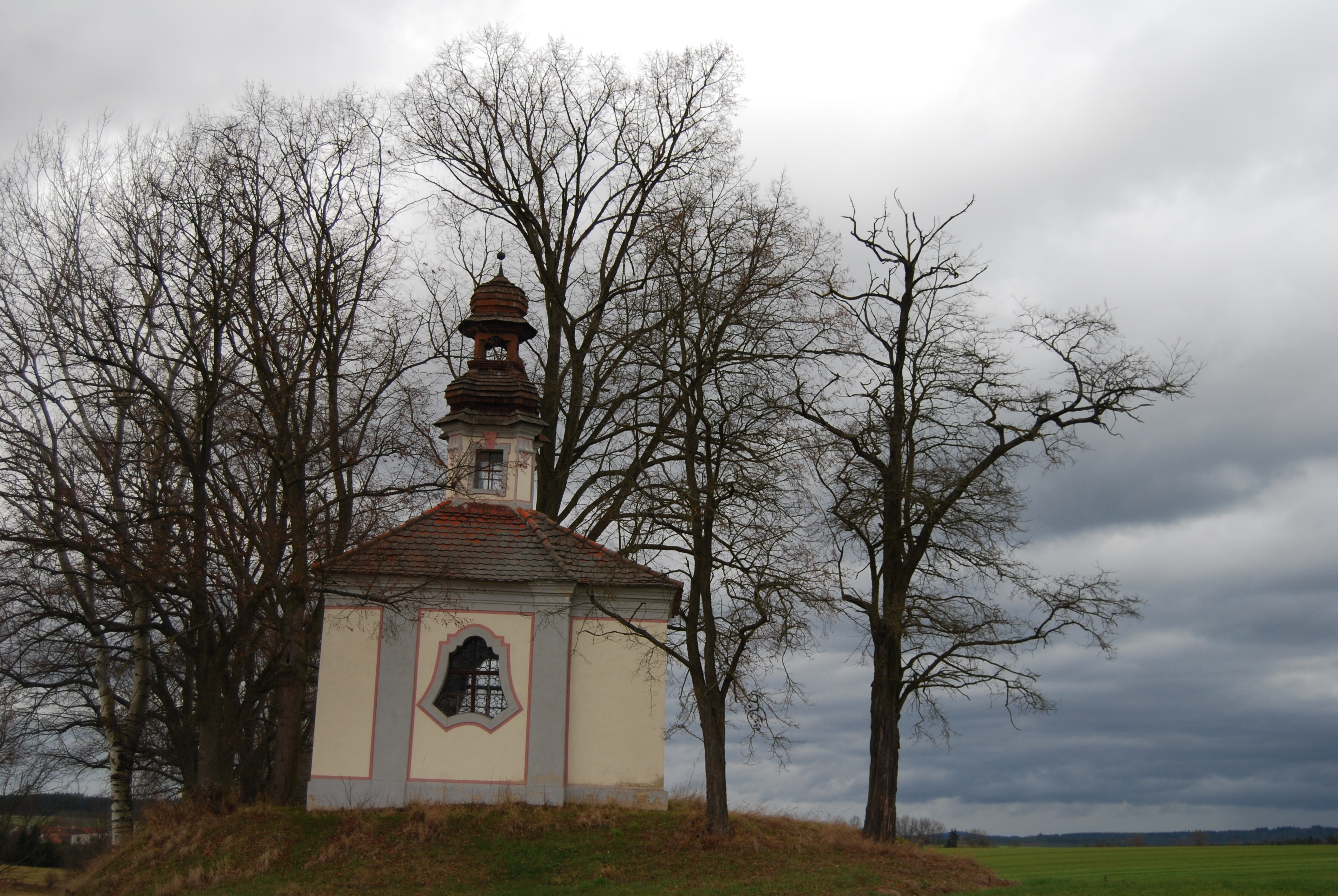 Kaple sv. Anny před obcí z 18. století. Chřešťovice. Část obce Albrechtice nad Vltavou v okrese Písek. Česká republika.